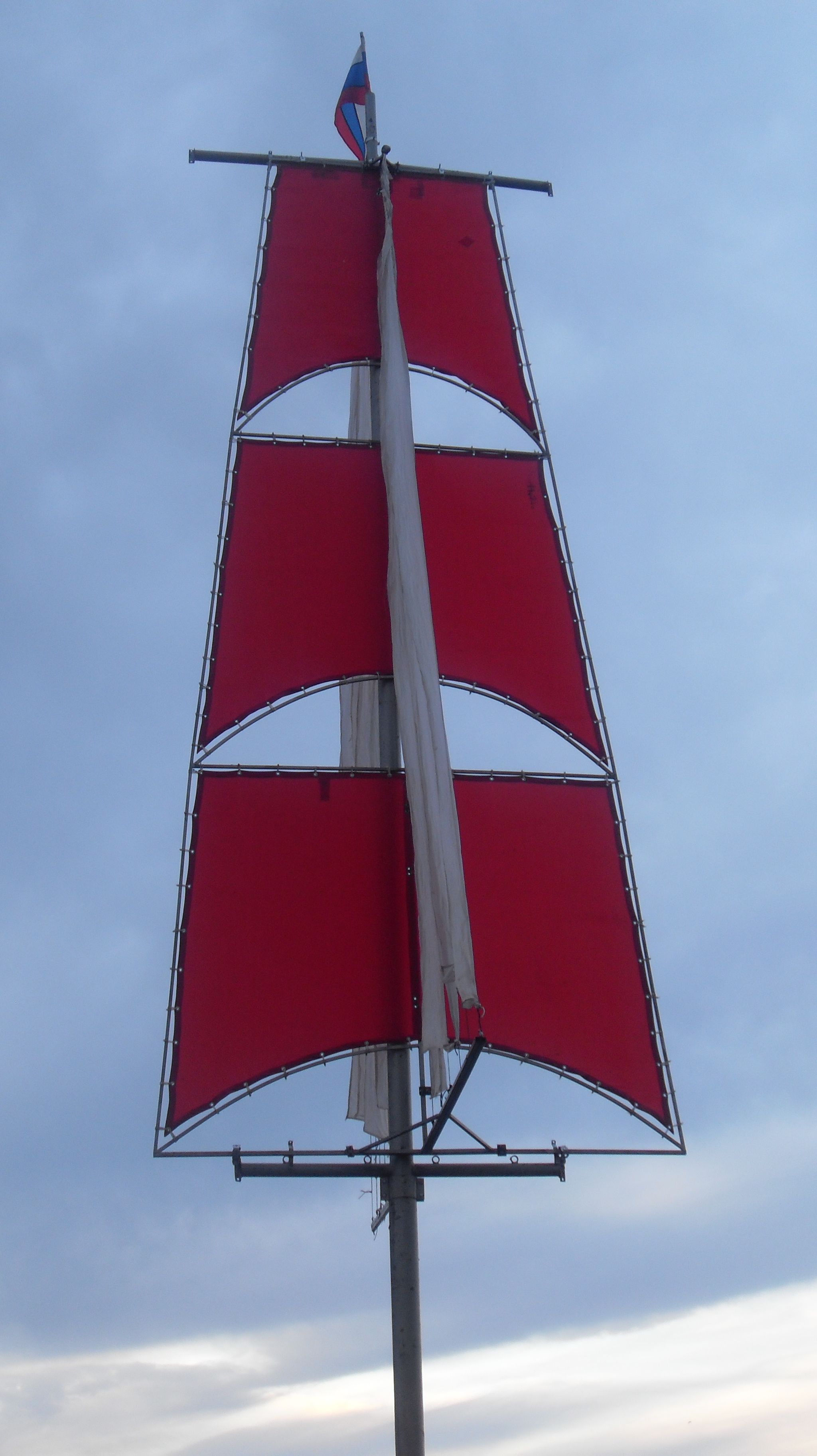 Фотография с празднования праздника "Алые паруса" в Санкт-Петербурге в 2010 году. На столбе висят флажки в виде парусов фрегата, что символизирует предстоящий праздник.